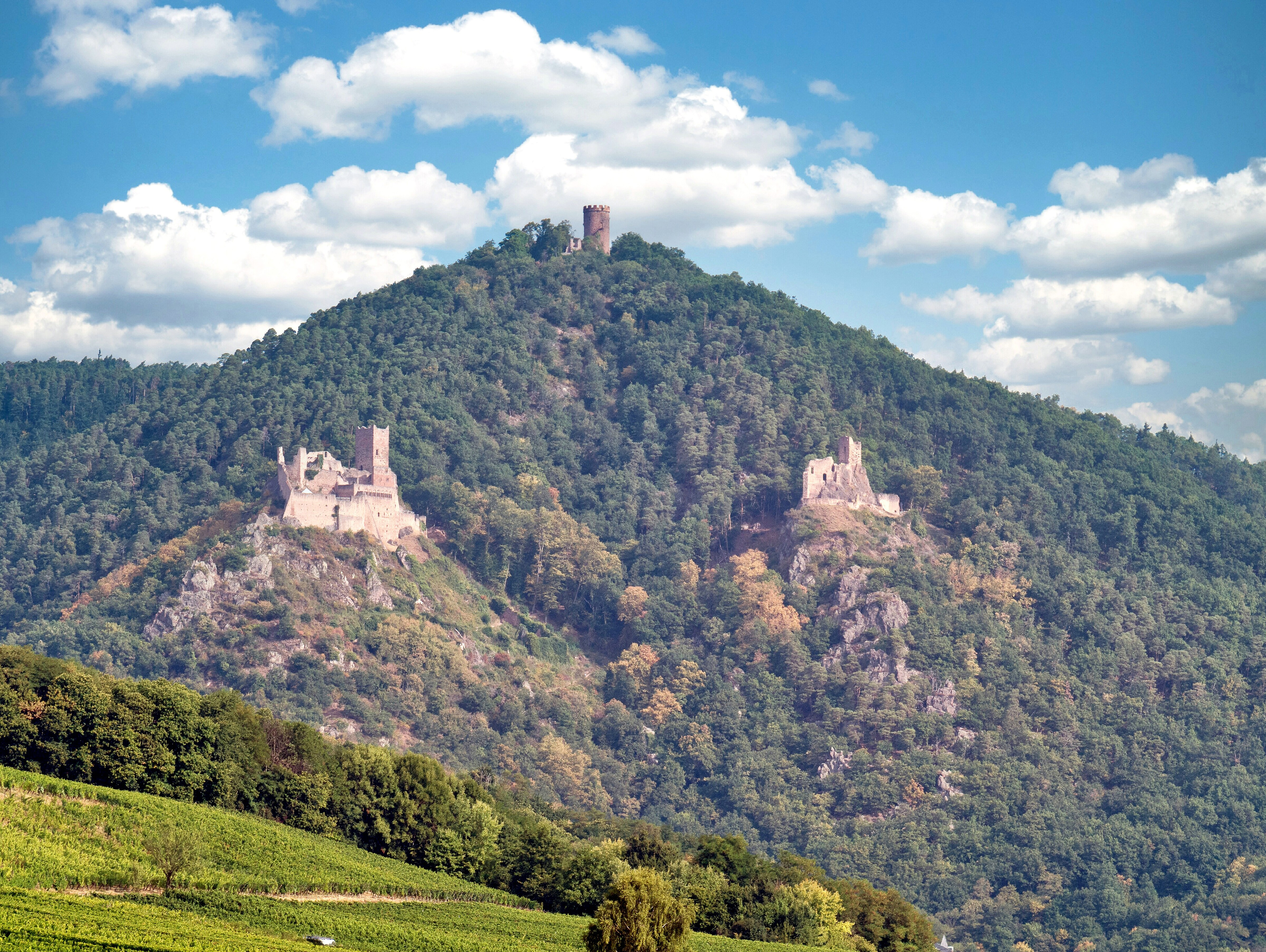 Die Rappoltsteiner Burgen: links die Ulrichsburg, rechts Burg Girsberg, oben auf dem Gipfel die Burg Hoh-Rappoltstein.